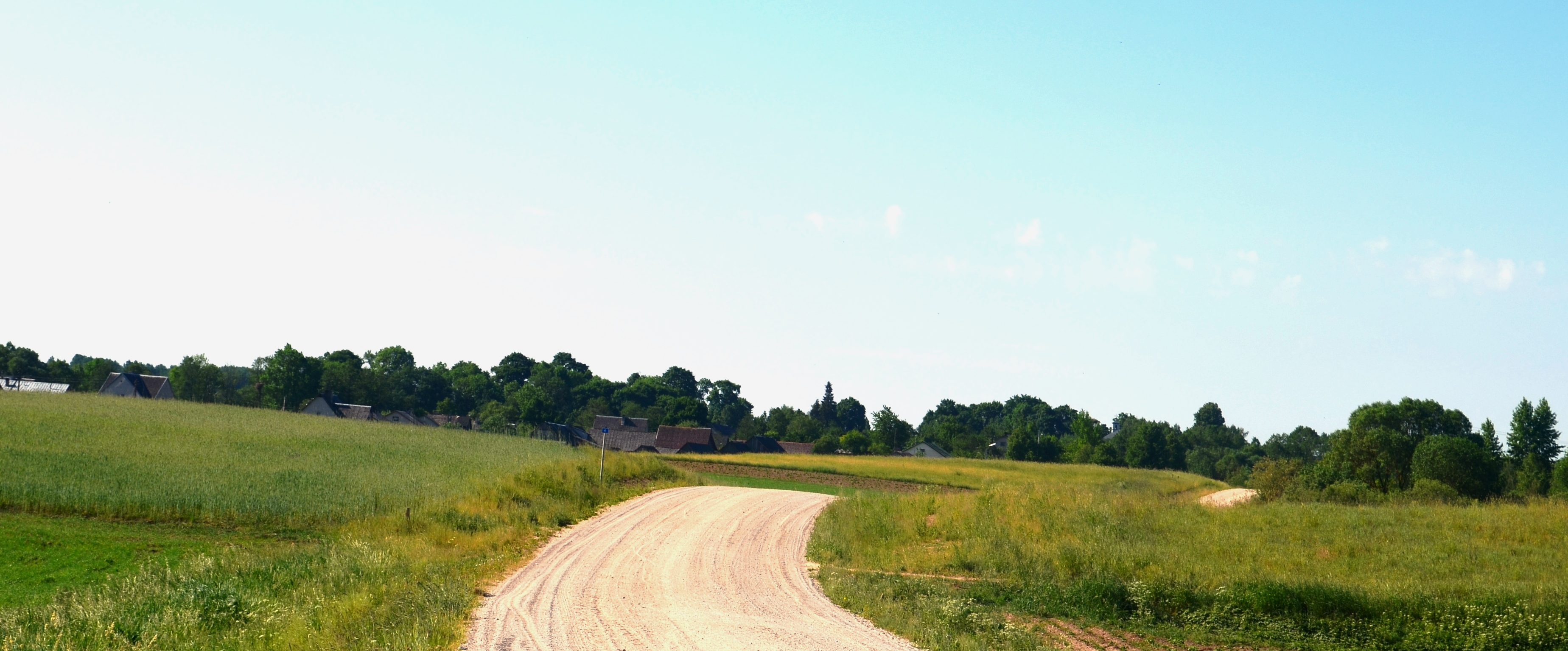 Sužionys, Vilniaus raj.